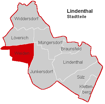 Lagekarte Weiden im Stadtbezirk Köln-Lindenthal